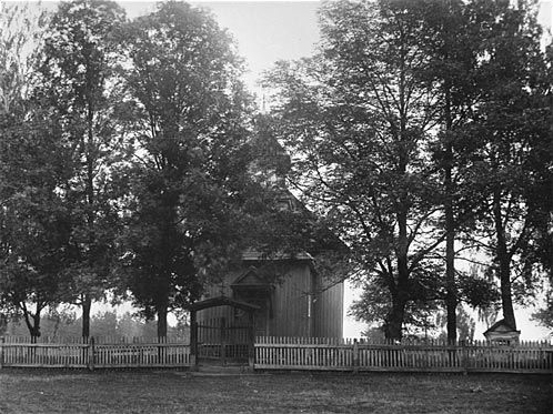 Беларуская (тарашкевіца): Насілава (Nasiłava). Царква Сьвятога Спаса